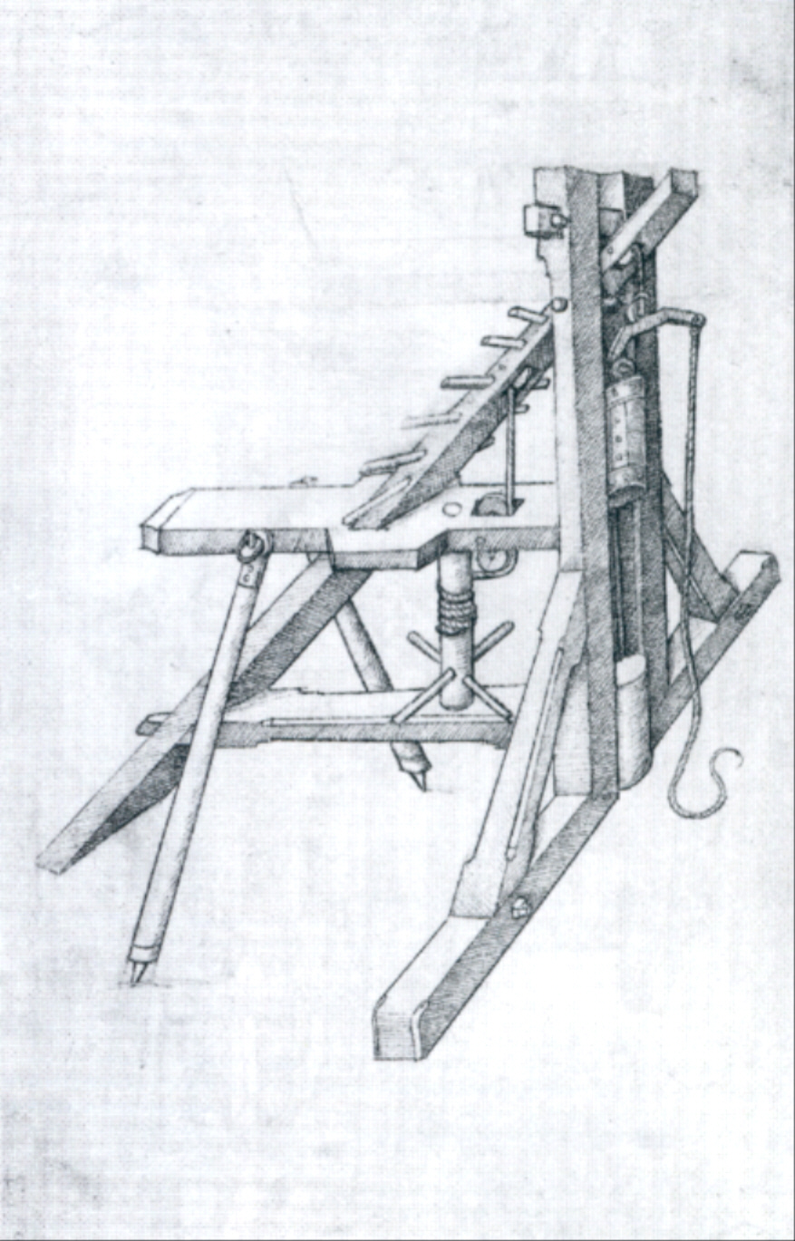 Mittelalterliches Hausbuch von Schloss Wolfegg Fol. 38r: Höhenverstellbare Ramme (Pile driver)